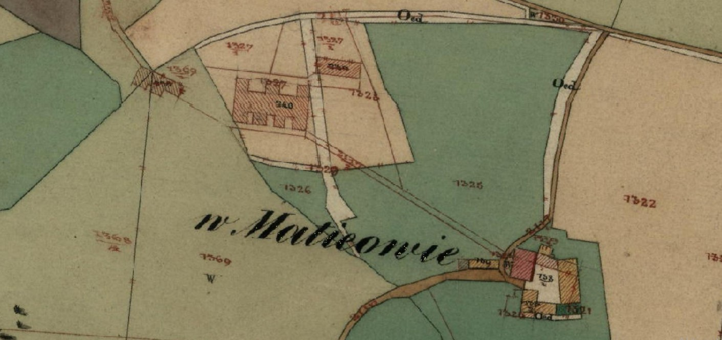 Kůsovská huť katastr.mapa z císařského měření z r. 1837, obec Stachy, okres Prachatice, Česko